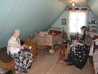 Scene in Arbær Museum. Public Domain